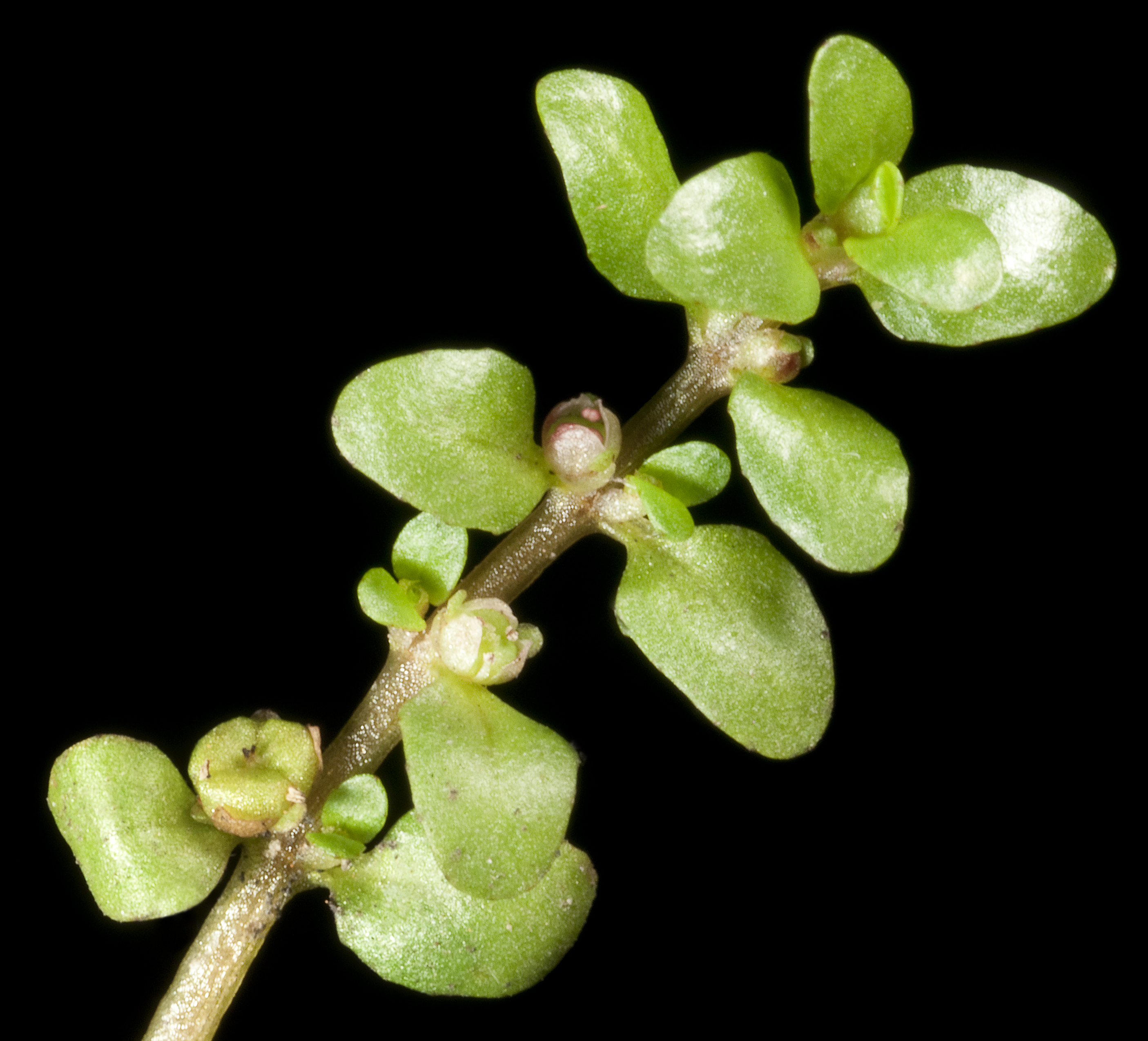 KRT4461 Western Australian Herbarium